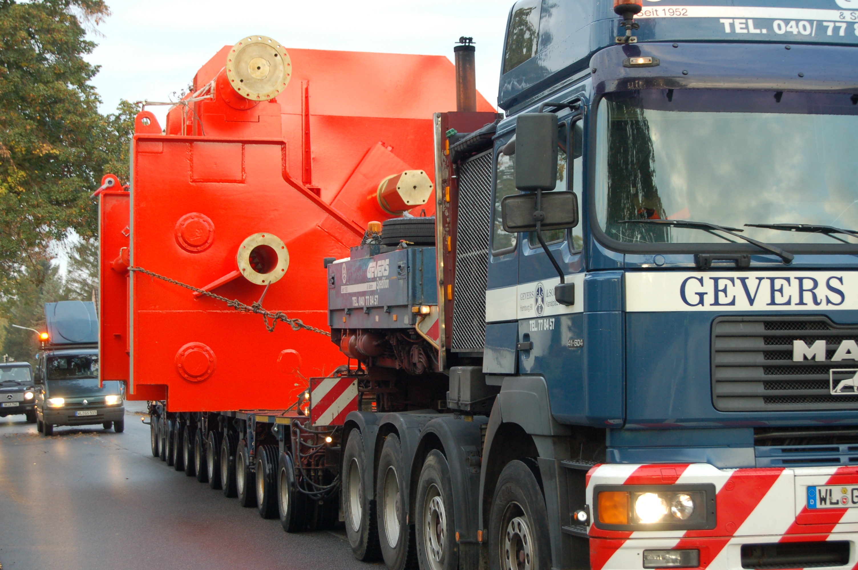 Seitenansicht des zweiten Teiles der Ankerwinde auf dem Weg zum Uetersener Hafen.